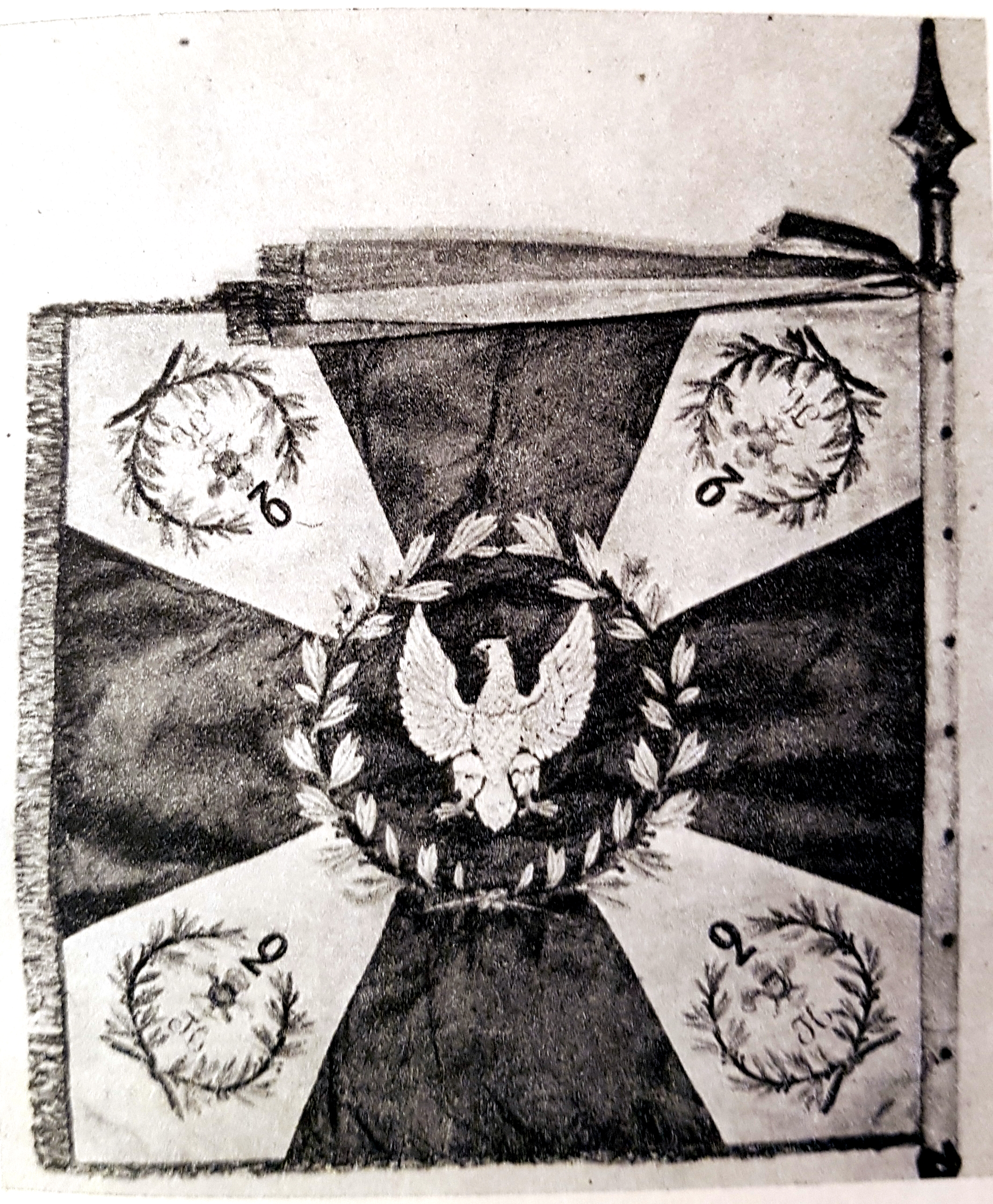 lewa strona sztandaru 2 pułku saperów kaniowskich